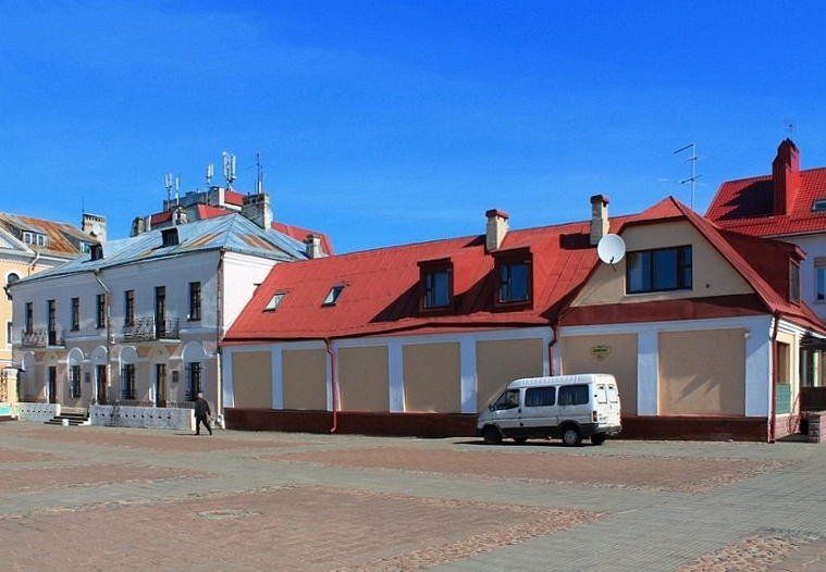 левы флігель Архірэйскага падворка